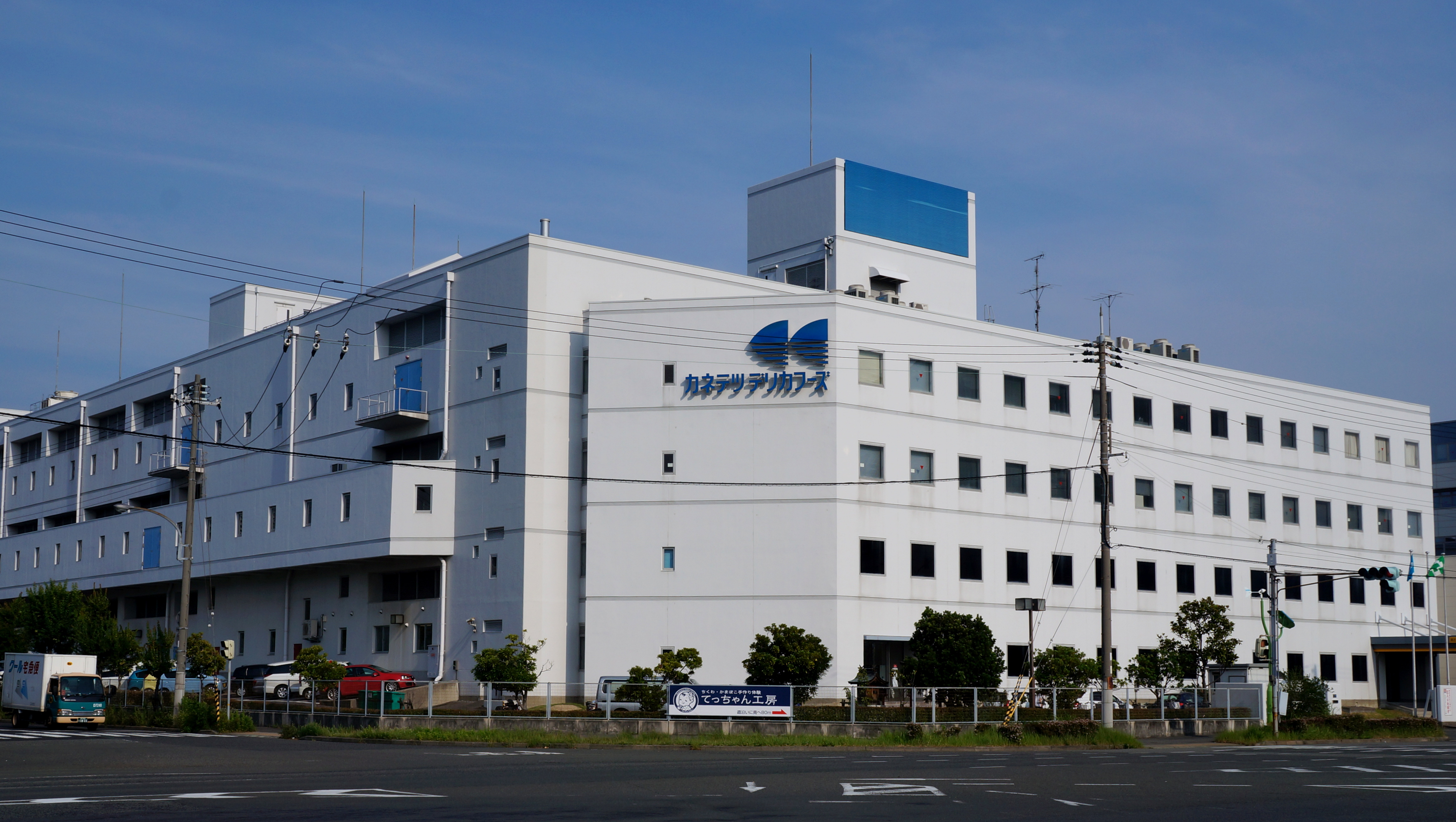 カネテツデリカフーズ本社社屋